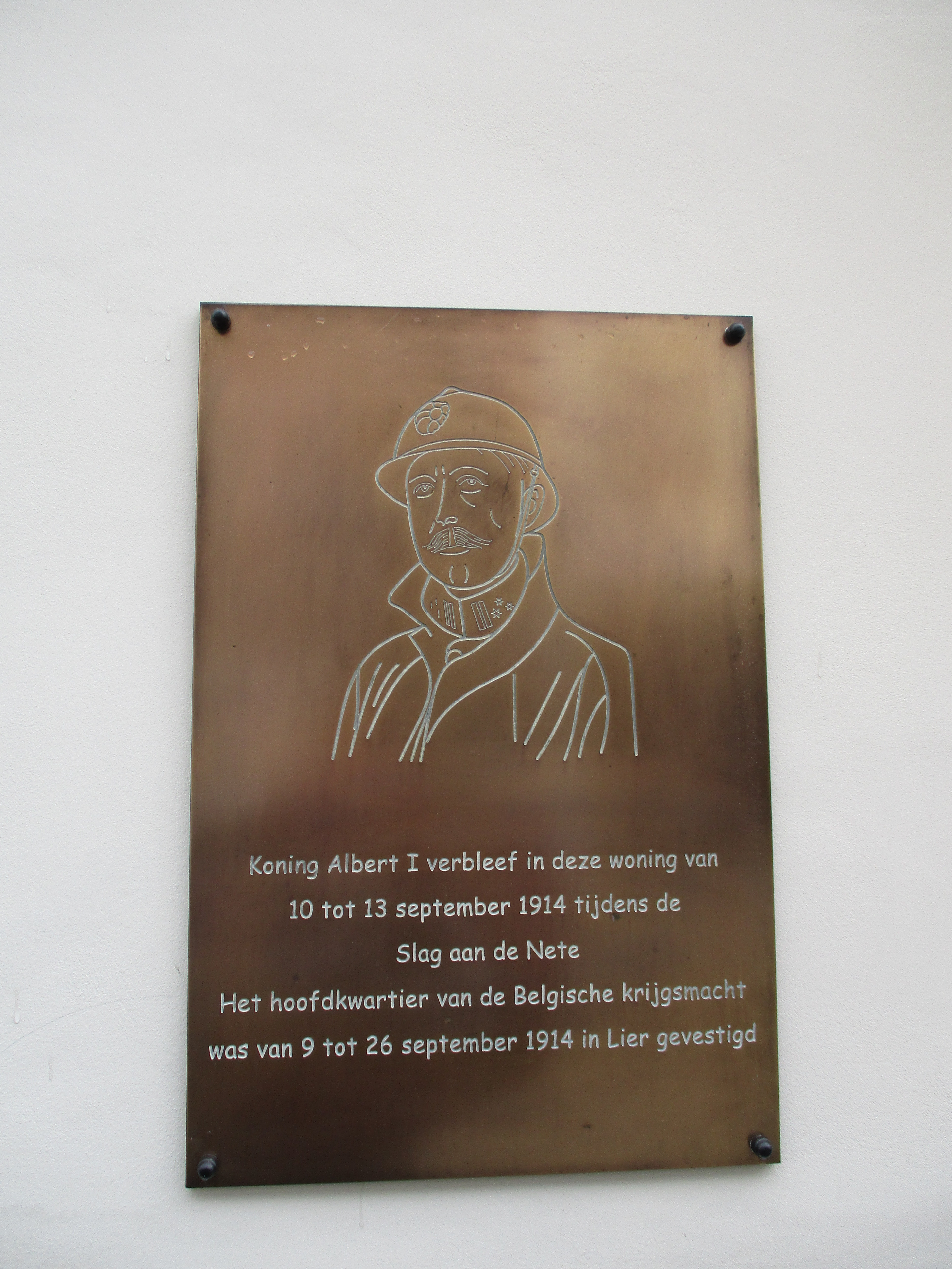 Gedenkplaat WO1 verblijf koning Albert I in Lier